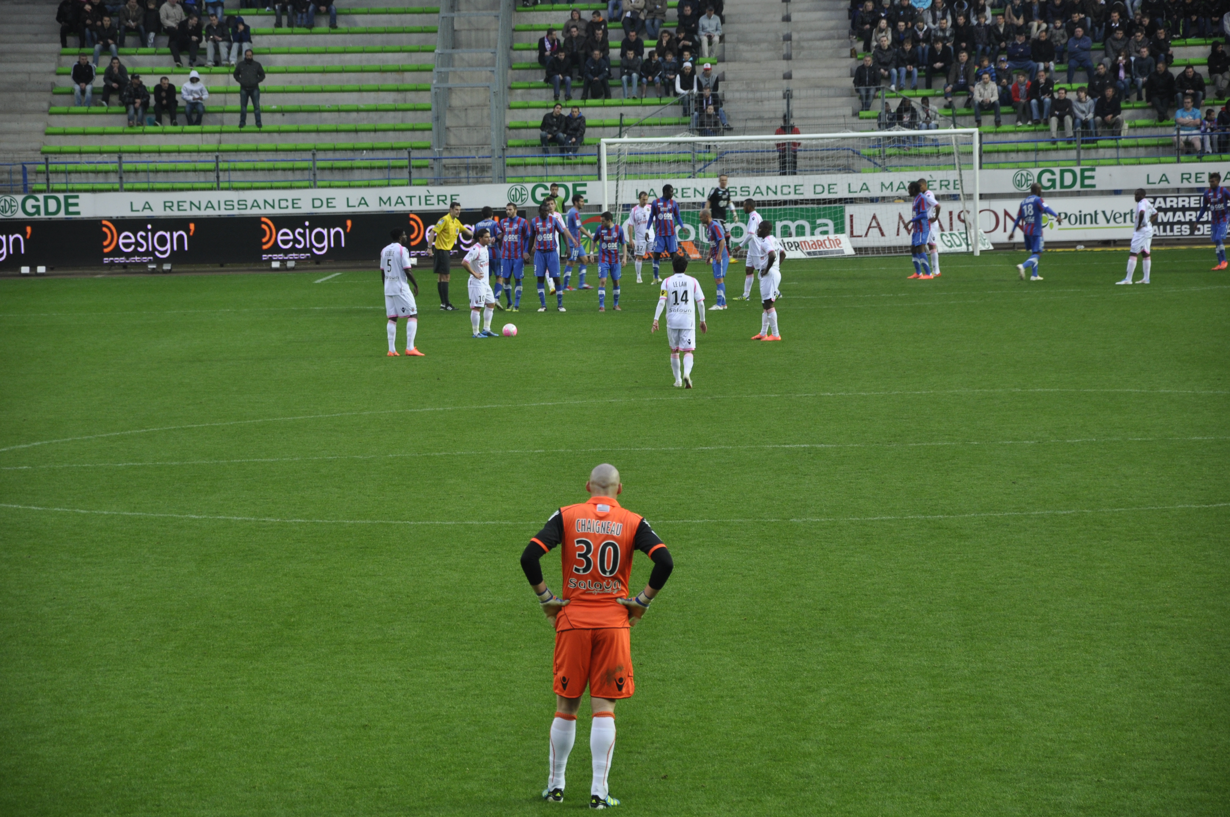 Dernière action du match entre Caen et Lorient pour le compte de la 35è journée du championnat de D1 2011-2012